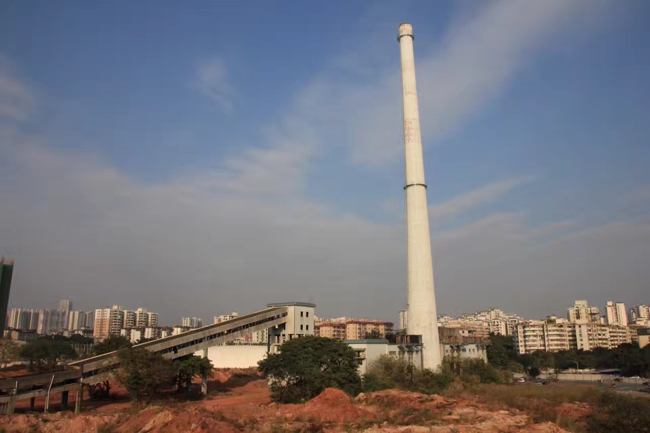 位于广东省广州市海珠区广纸路40号内。